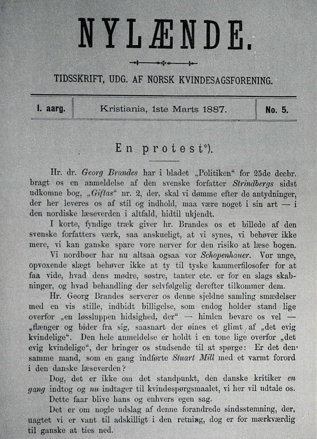 Et innlegg av Camilla Collett i Norges første kvinnesakstidsskrift, Nylænde, som ble redigert av Gina Krog fra grunnleggelsen i 1887.